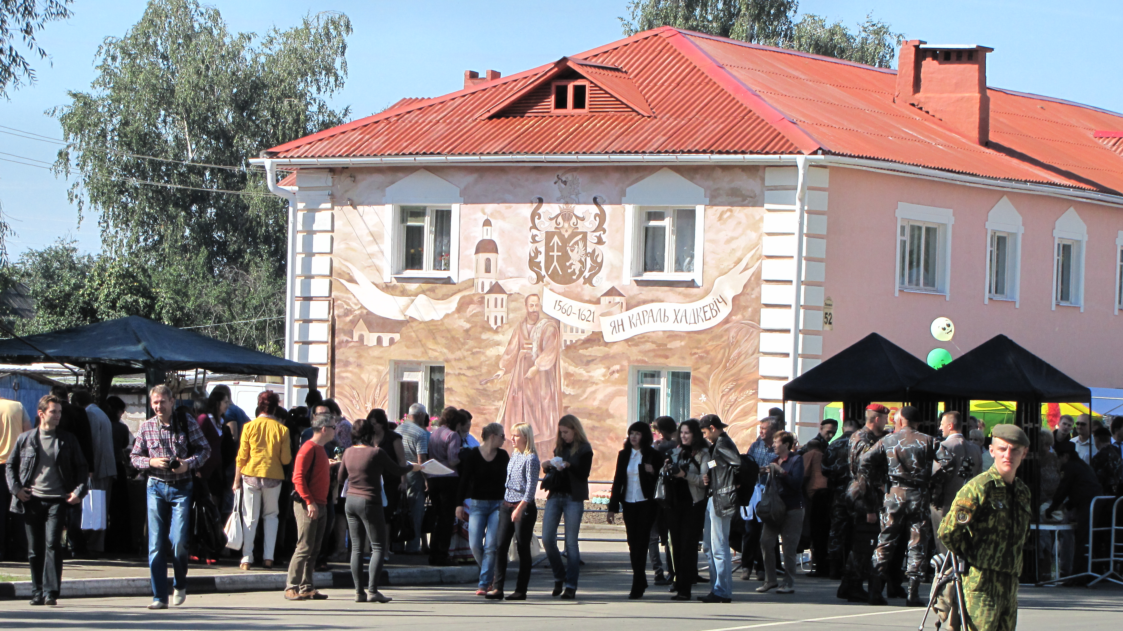 Беларуская (тарашкевіца): ДБП 2013, Быхаў